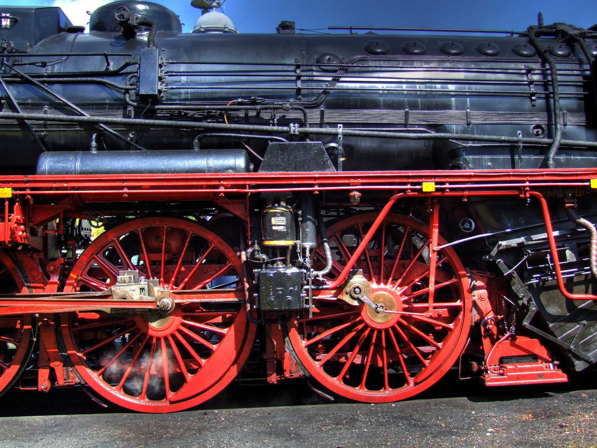 Schnellzug-Dampflokomotive 03 1010-2 Detail